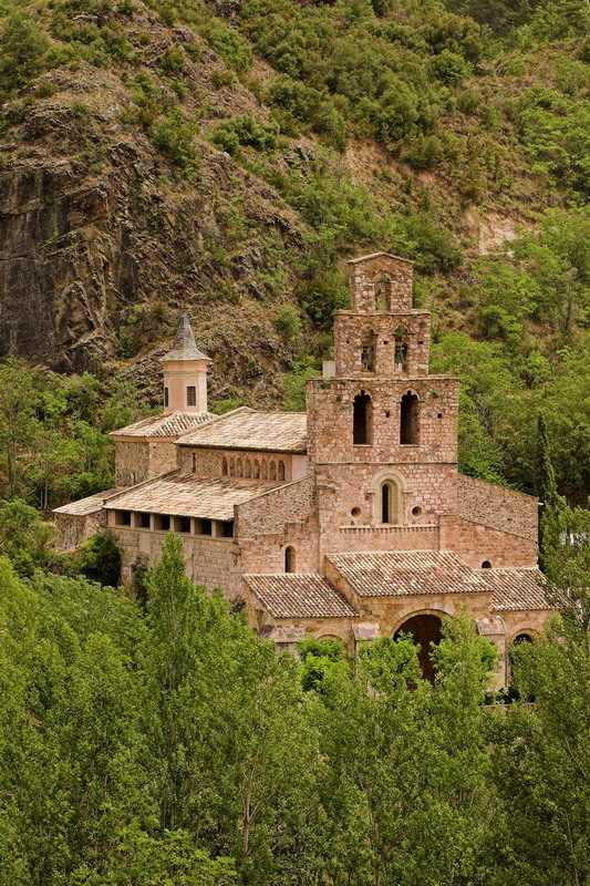 Monestir de Gerri de la Sal (Baix Pallars, Pallars Sobirà). Romànic s.XII-XIII